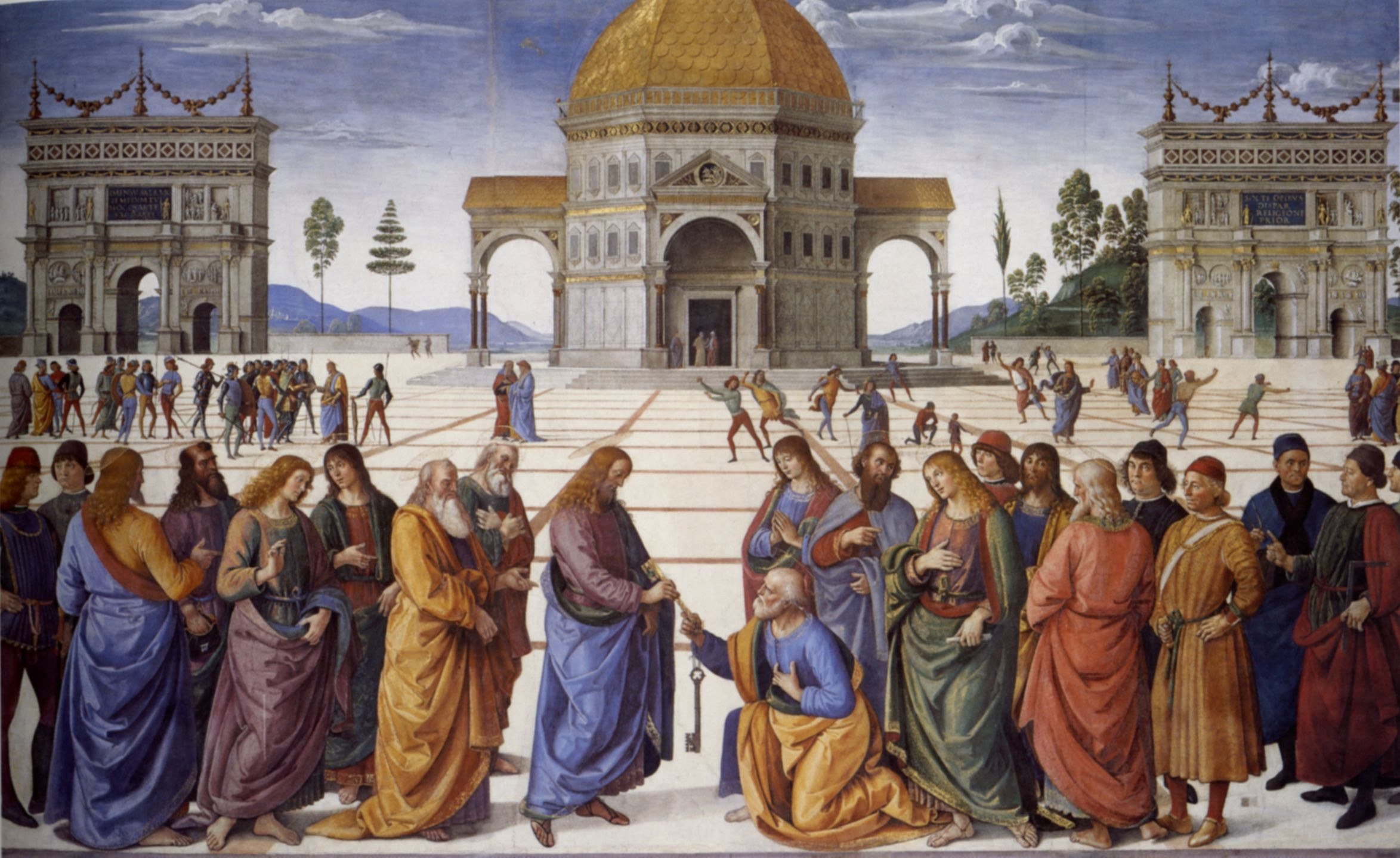 Pietro Perugino: Cappella Sistina (Cristo consegna le chiavi a Pietro). Cat. no. 13 in Vittoria Garibaldi: Perugino. Catalogo completo. Octavo, Firenze 2000, ISBN 88-8030-091-1